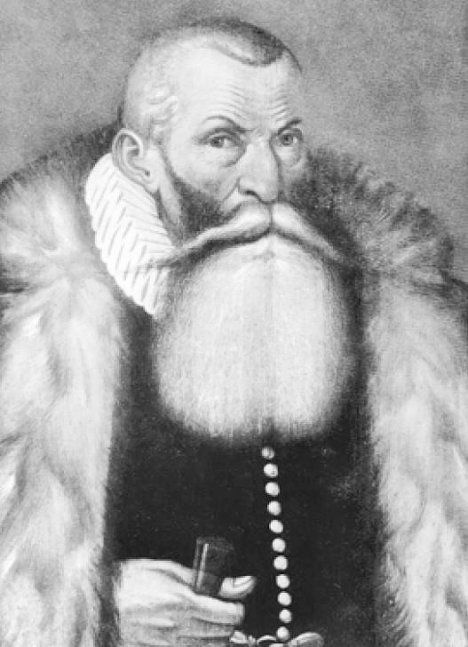 Heinrich Werdmüller 1554-1627, Zürich, Schweiz